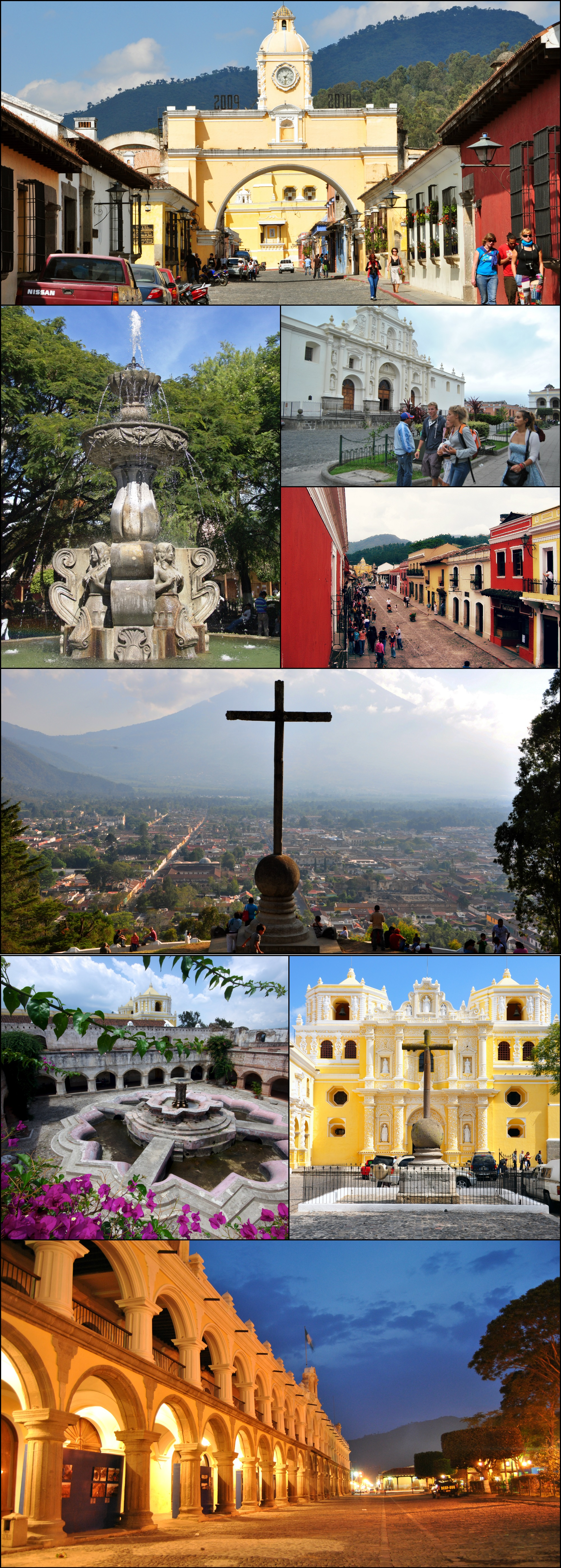 Una colección de fotos de la ciudad de La Antigua Guatemala.